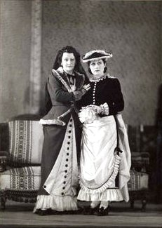 Szigeti József: Rang és mód. Nemzeti Színház. Bemutató: 1938-03-03. Rendező: Kiss Ferenc. Szereplők: Clarisse: T. Mátray Erzsi, Irma: Somogyi Erzsi.